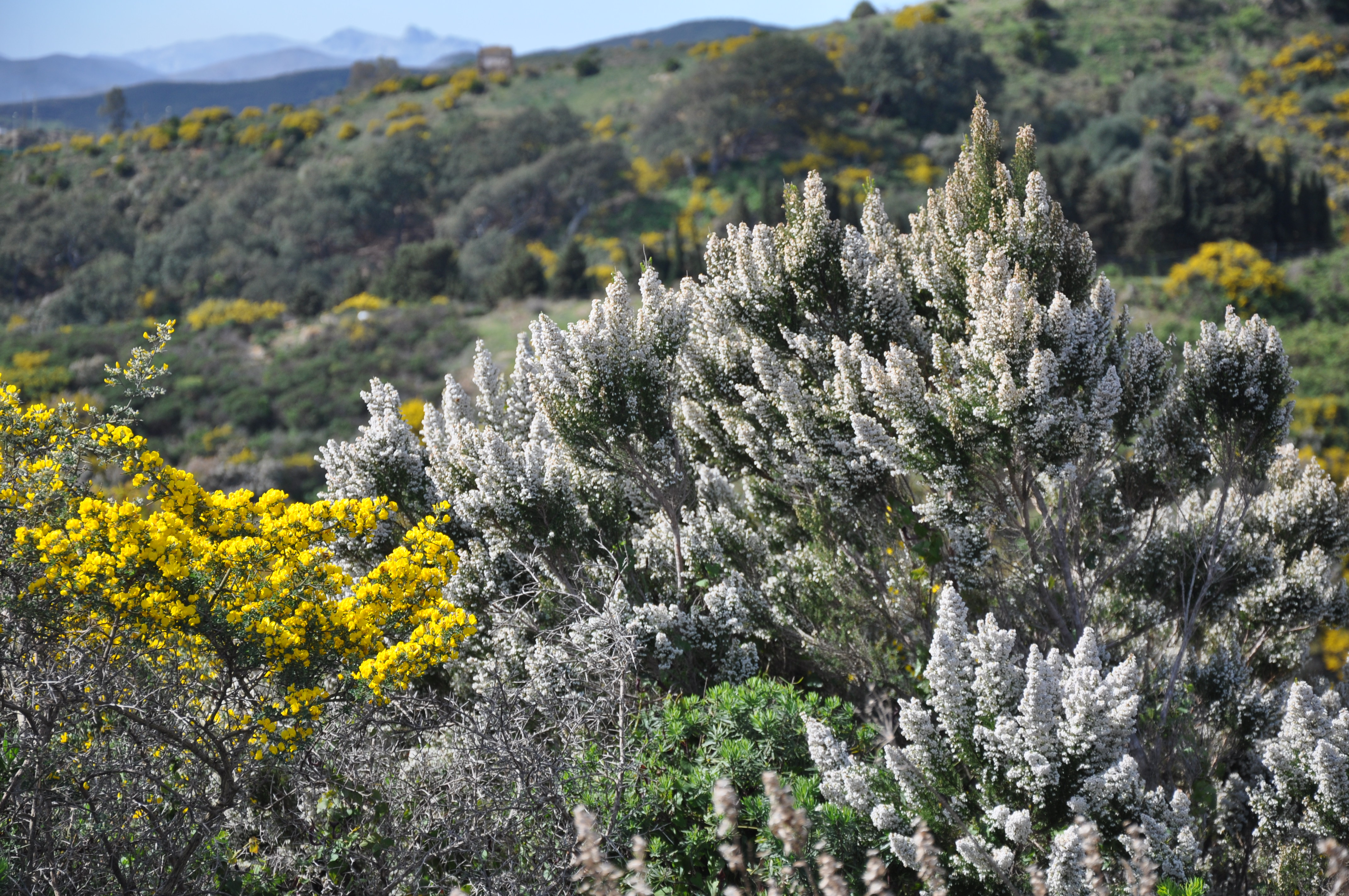 Brezo blanco y herguén, noroeste de África.